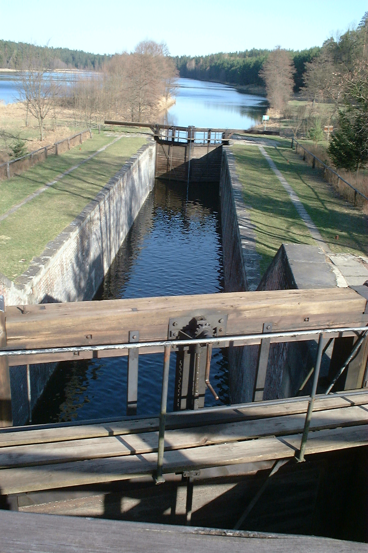 Poland, Paniewo lock, part of Augustowski Canal, and Krzywe Lake.